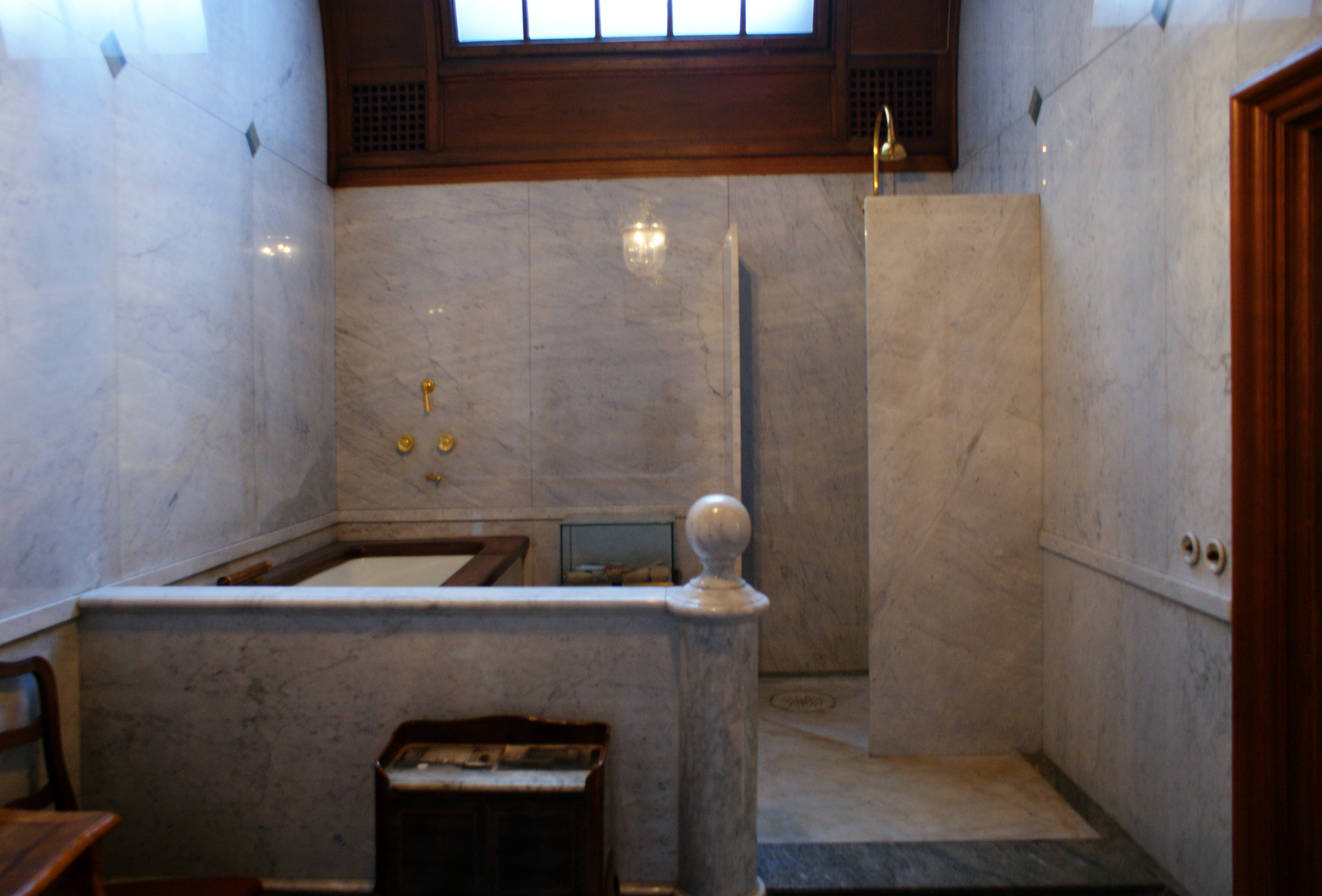 Badrummet i Hallwylska museet.